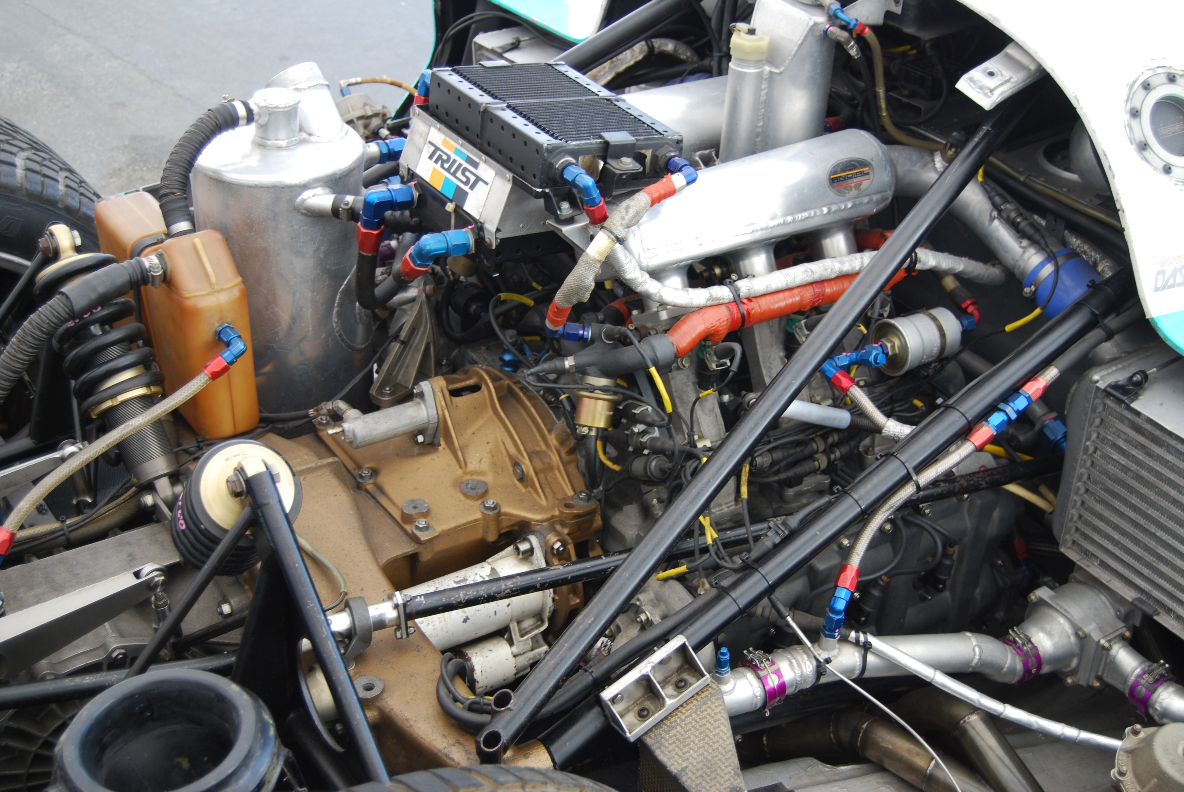 6e10_DSC_0341